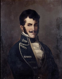 José María Barreiro, ca. 1818. Colección Museo Nacional de Colombia. Reg. 516.